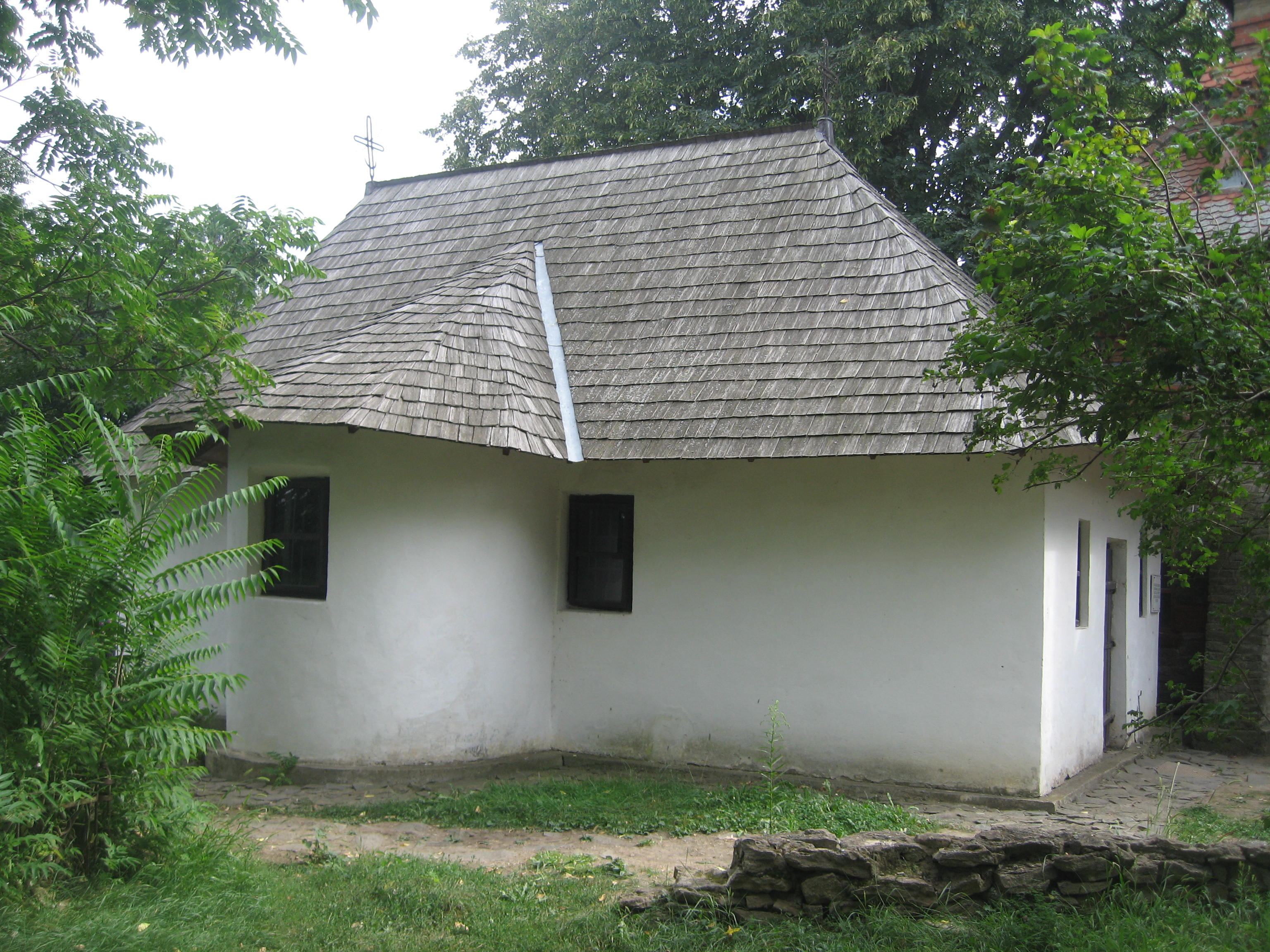 Biserica de lemn din Ipotesti